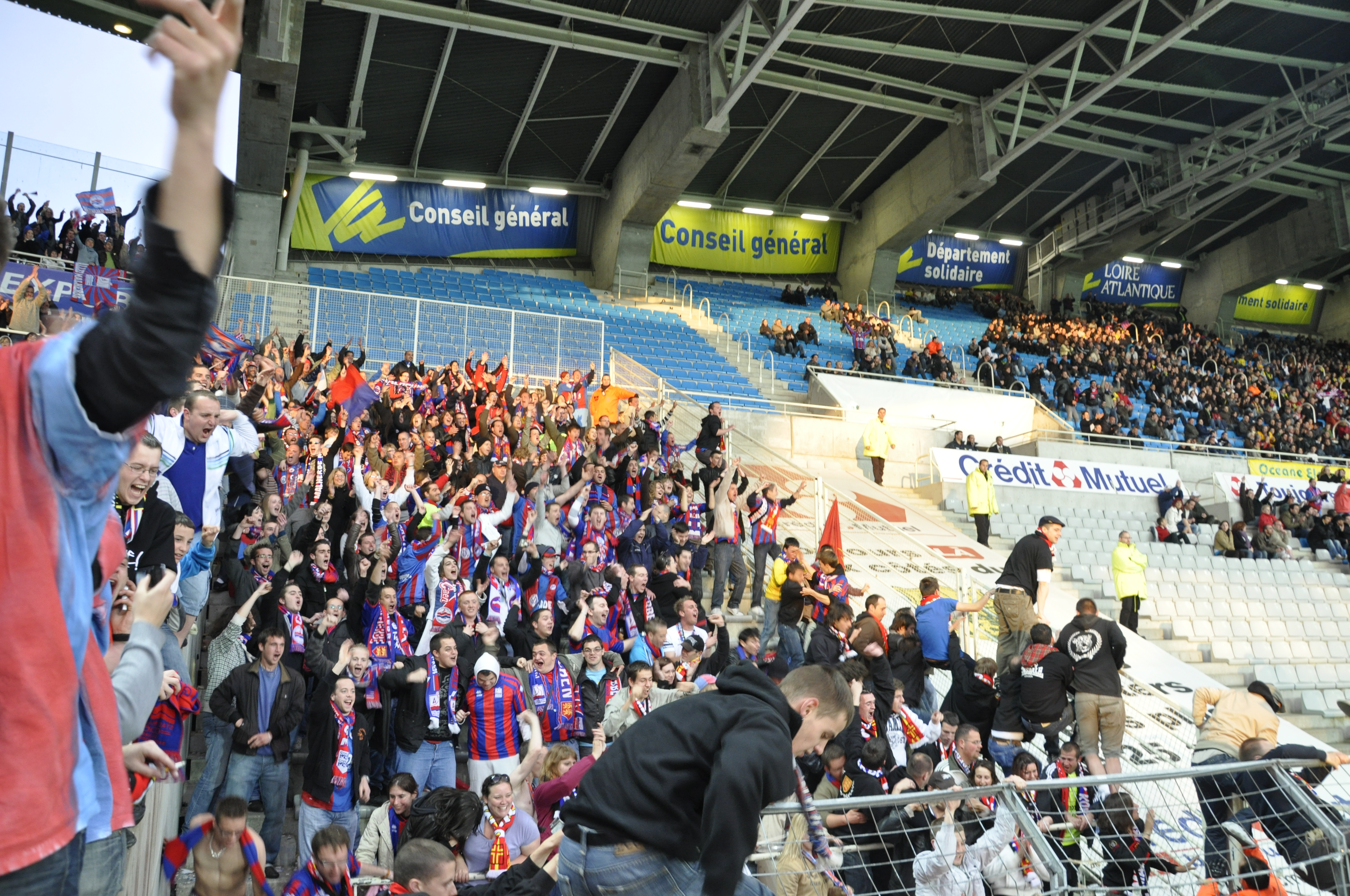 supporters caennais lors du match Nantes-Caen pour le compte de la 38ème journée de championnat de ligue 2 2009-2010